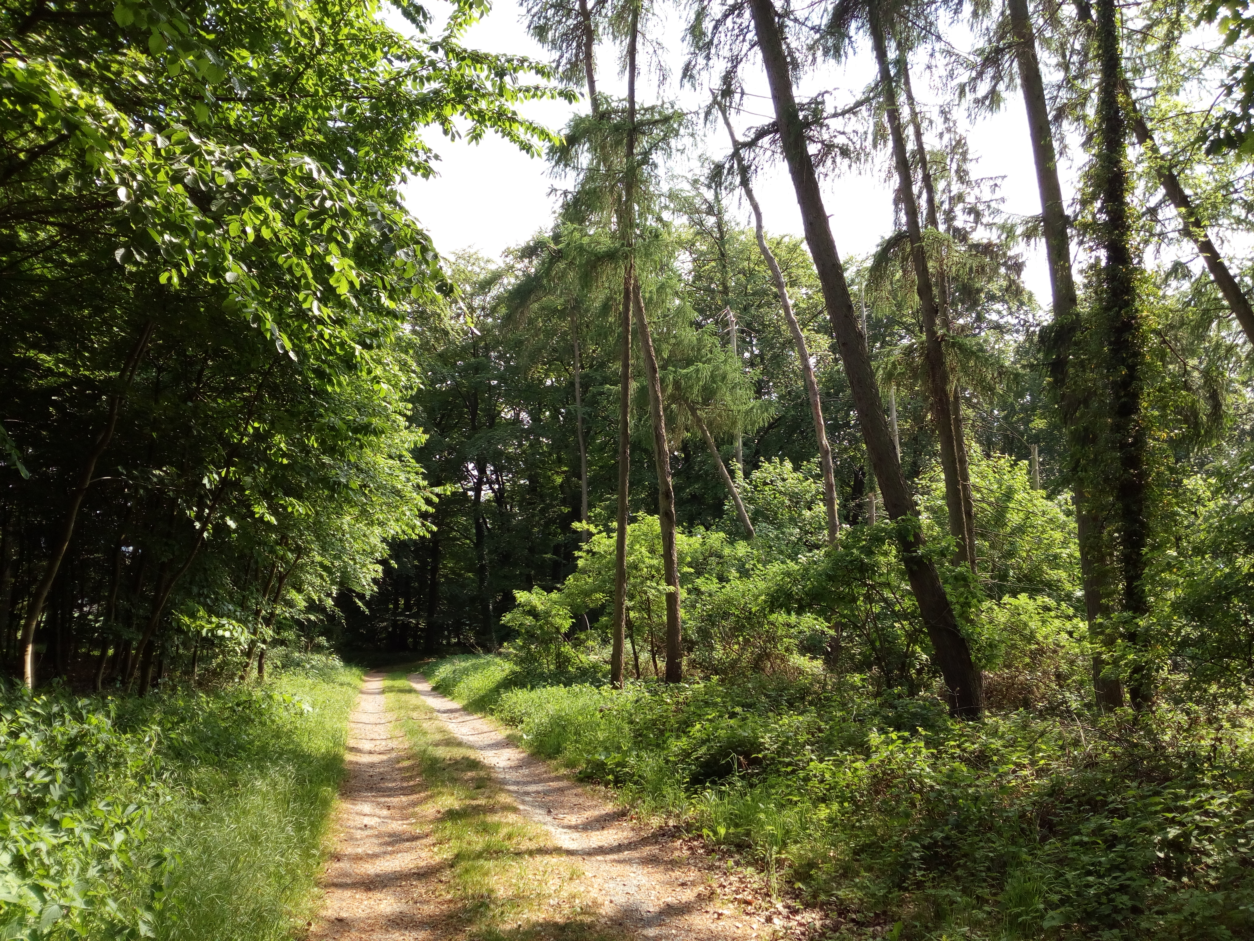 Herrliche kleine Ortschaft incl. Waldgebiet mit Ehrenmal, Wasserwerk und toller Aussicht auf Melle.